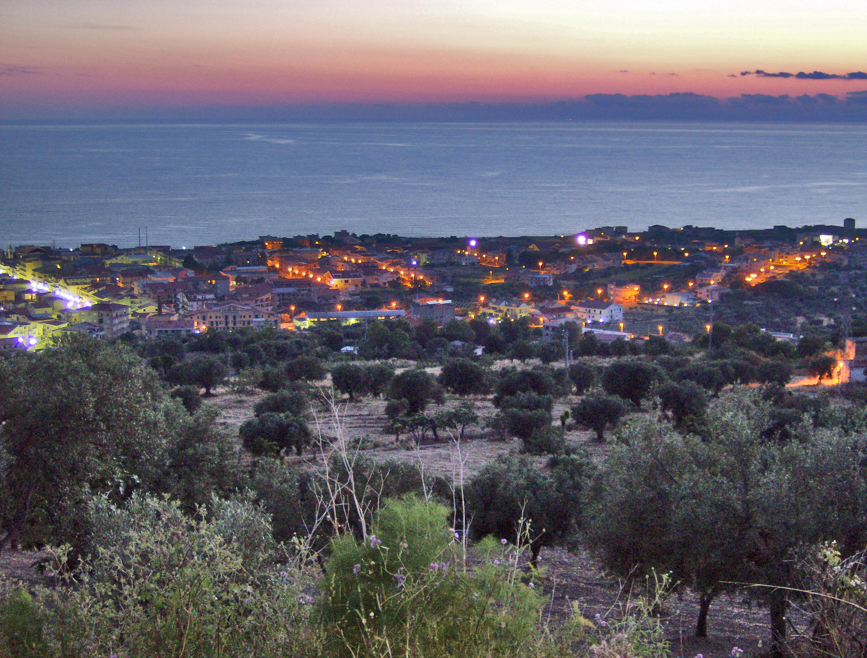 Io sottoscritto Luigi Salvatore Vadacchino, utente di Wikipedia sotto il nome di Lodewijk Vadacchino, cedo l'immagine HPIM0659.jpg a Wikimedia Italia, sotto licenza CC-BY-SA, con il nome Campora San Giovanni 09 Panarama Inicio Verano Tarde.jpg. L'Immagine fotografica raffigura la mia cittadina natale di Campora San Giovanni, ovvero una sua panoramica al tramonto con uno scorcio di flora locale. Porgo come sempre i miei distintissimi saluti, con l'augurio che possiate venirmi a far visita. Vostro come sempre --Lodewijk Vadacchino (msg) 16:19, 5 giu 2009 (CEST)